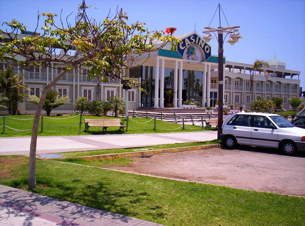 Casino de Iquique